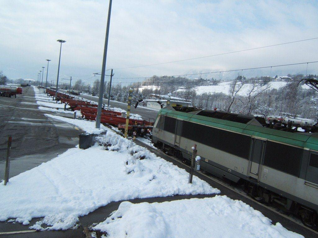 Système, train et wagon Modalohr, plateforme d'Aiton, Savoie, France